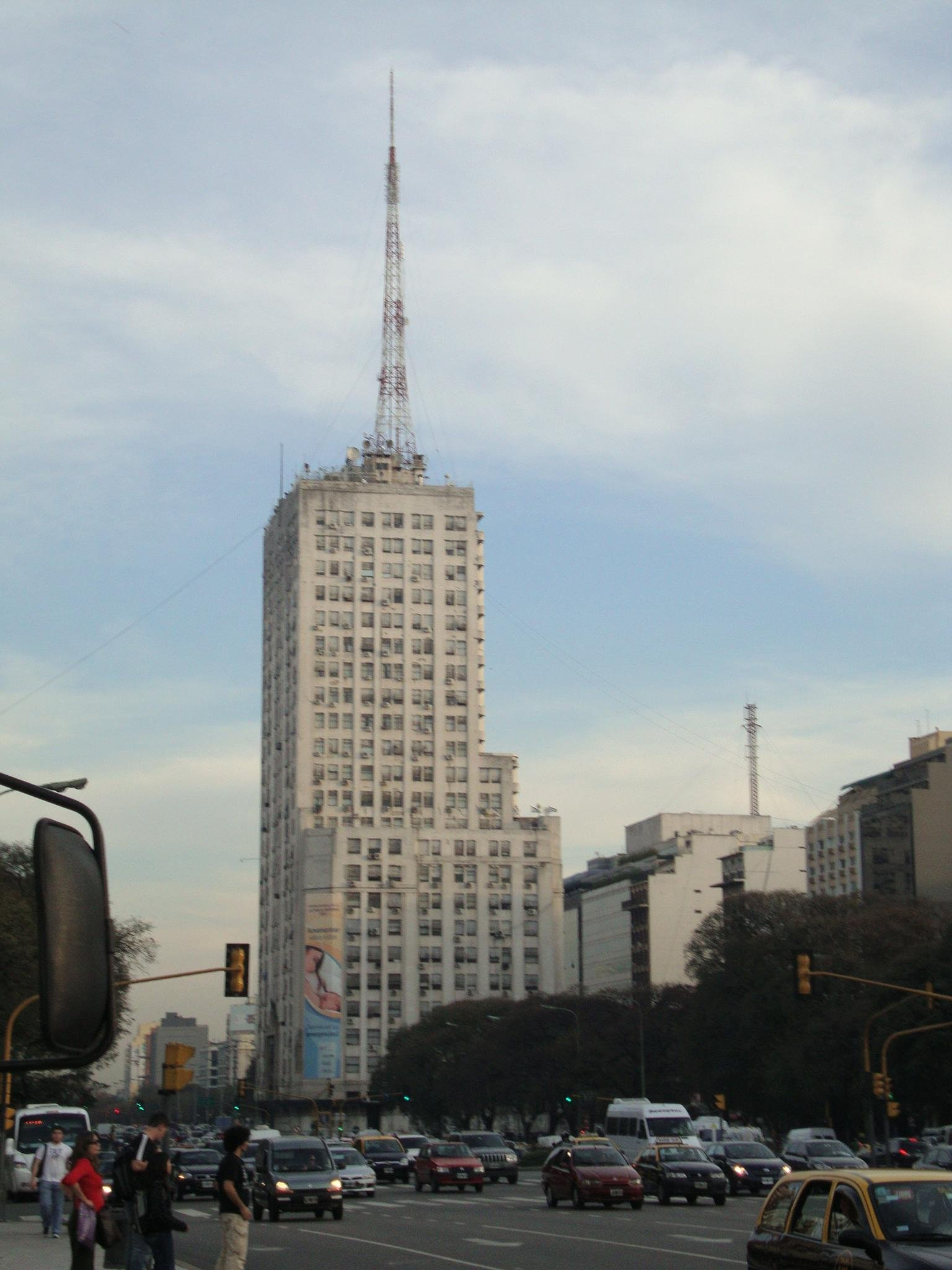 El Edificio del Ministerio de Salud y del Ministerio de Desarrollo Social(ex Ministerio de Obras Públicas, 1936) visto desde la Avenida 9 de Julio y Avenida de Mayo. Buenos Aires, Argentina.